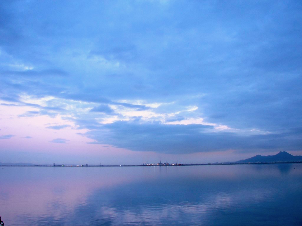 Lac de Tunis, Tunisia